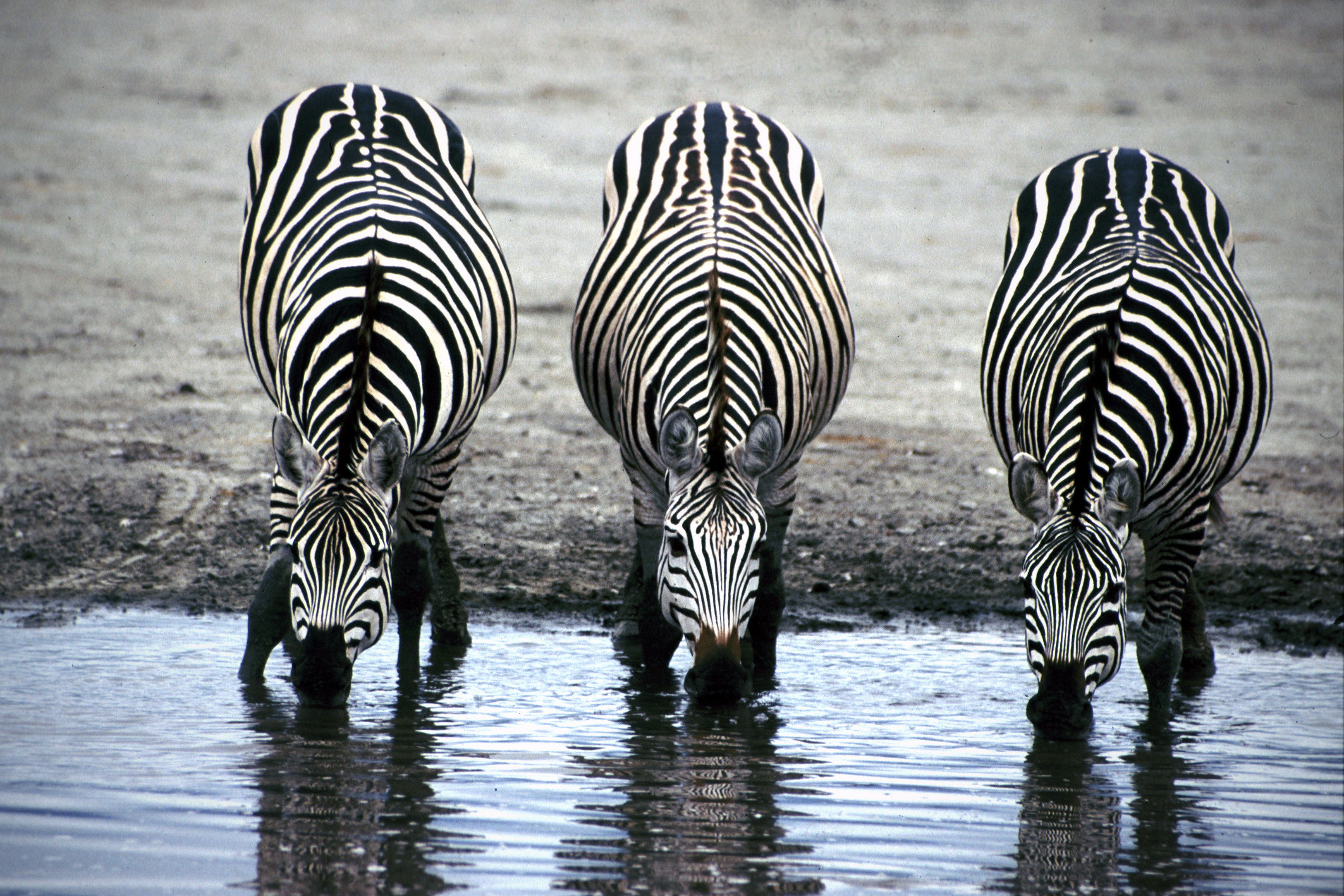 Three zebras drinking. Taken on safari in Tanzania.